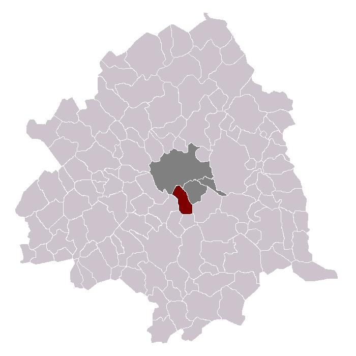 Faches-Thumesnil dans son canton et arrondissement